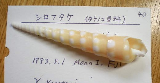 シロフタケ。フィジーのマナ島のサンセットビーチでひろった。